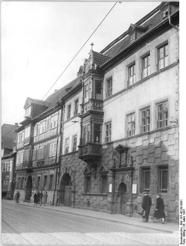 Erfurt, Haus "Zum Stockfisch" Zentralbild Erfurt (Wittig) 26.3.1957 Quasch-Ho. 350 Jahre Haus "Zum Stockfisch" in Erfurt. Eines der schönsten und interessantesten Bauwerke der Deutschen Renaissance, das Haus " Zum Stockfisch" in Erfurt, kann in diesen Tagen auf das Alter von 350 Jahren zurückblicken. Über dem Eingangsportal befindet sich das Bild eines Stockfisches und die Inschrift über der Torfahrt besagt, dass es im Jahre 1607 erbaut wurde. Unbekannt ist jedoch der Baumeister dieses historischen Meisterwerkes. Ursprünglich diente es als Handelshaus eines Weidhändlers: spätere Besitzer verunstalteten es durch Einbauen von Wänden und Anbringung hässlicher Reklameschilder, 1905 gelangte es in städtischen Besitz. Man besserte die Schäden aus, und so wurde das Haus in seiner alten Schönheit wiederhergestellt. Seitdem bot es vielen städtischen Einrichtungen Unterkunft und heute beherbergt es das Museum für Naturkunde. UBz: Vorderfront des Hauses "Zum Stockfisch" in Erfurt.